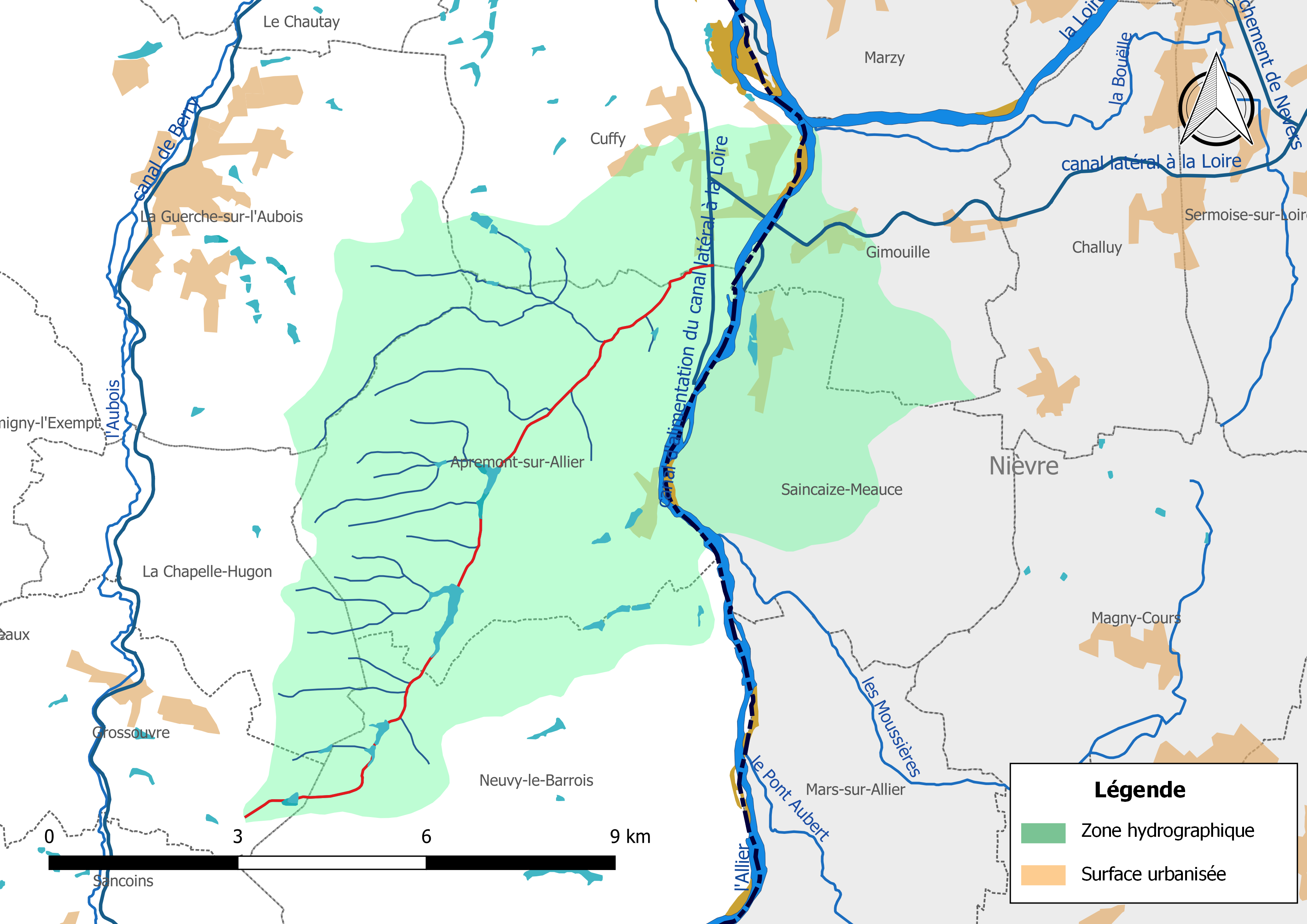 Carte du cours d'eau « les Barres » (France) et de la zone hydrographique dans laquelle il s'insère.